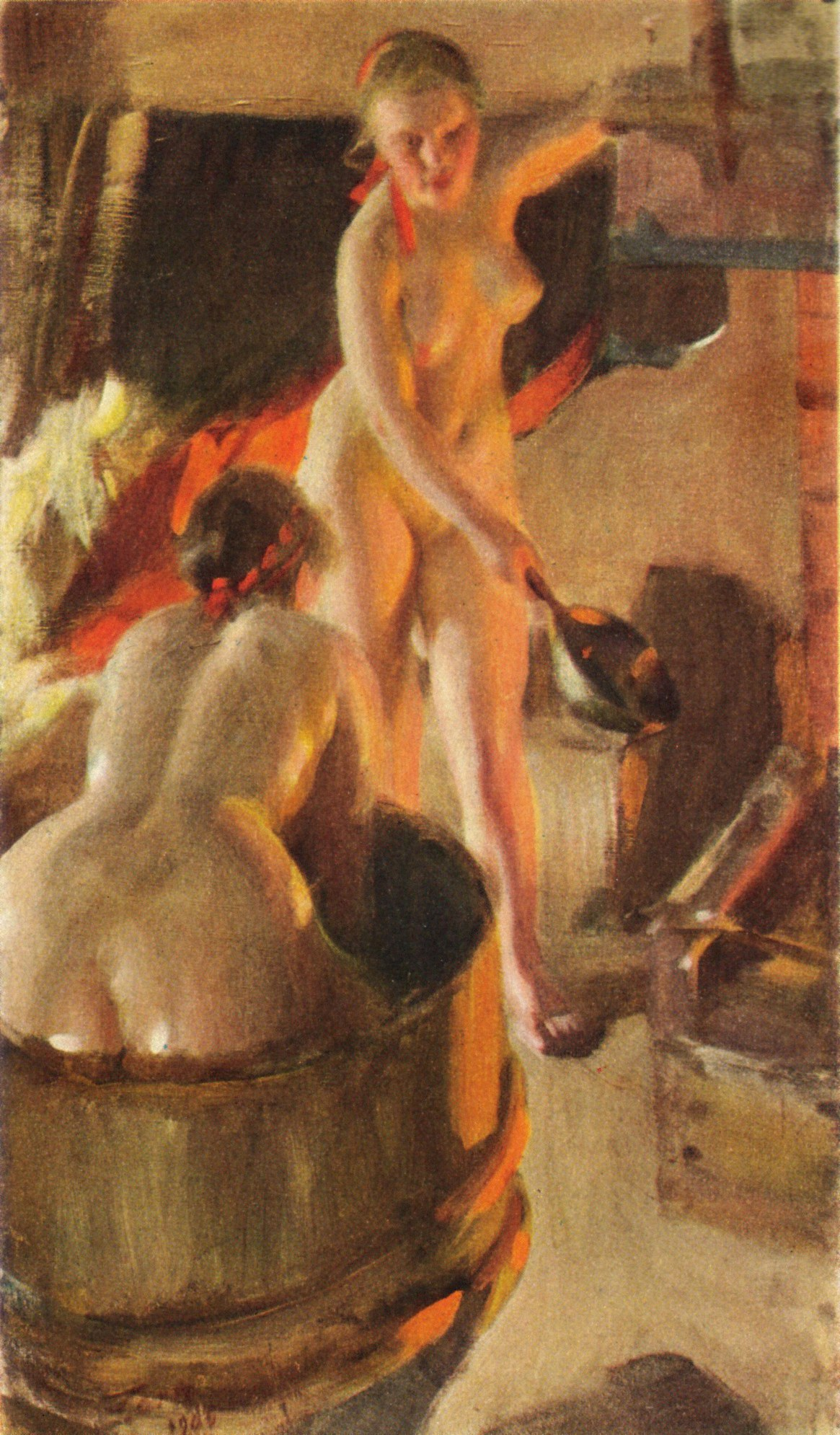 pp. 26-27